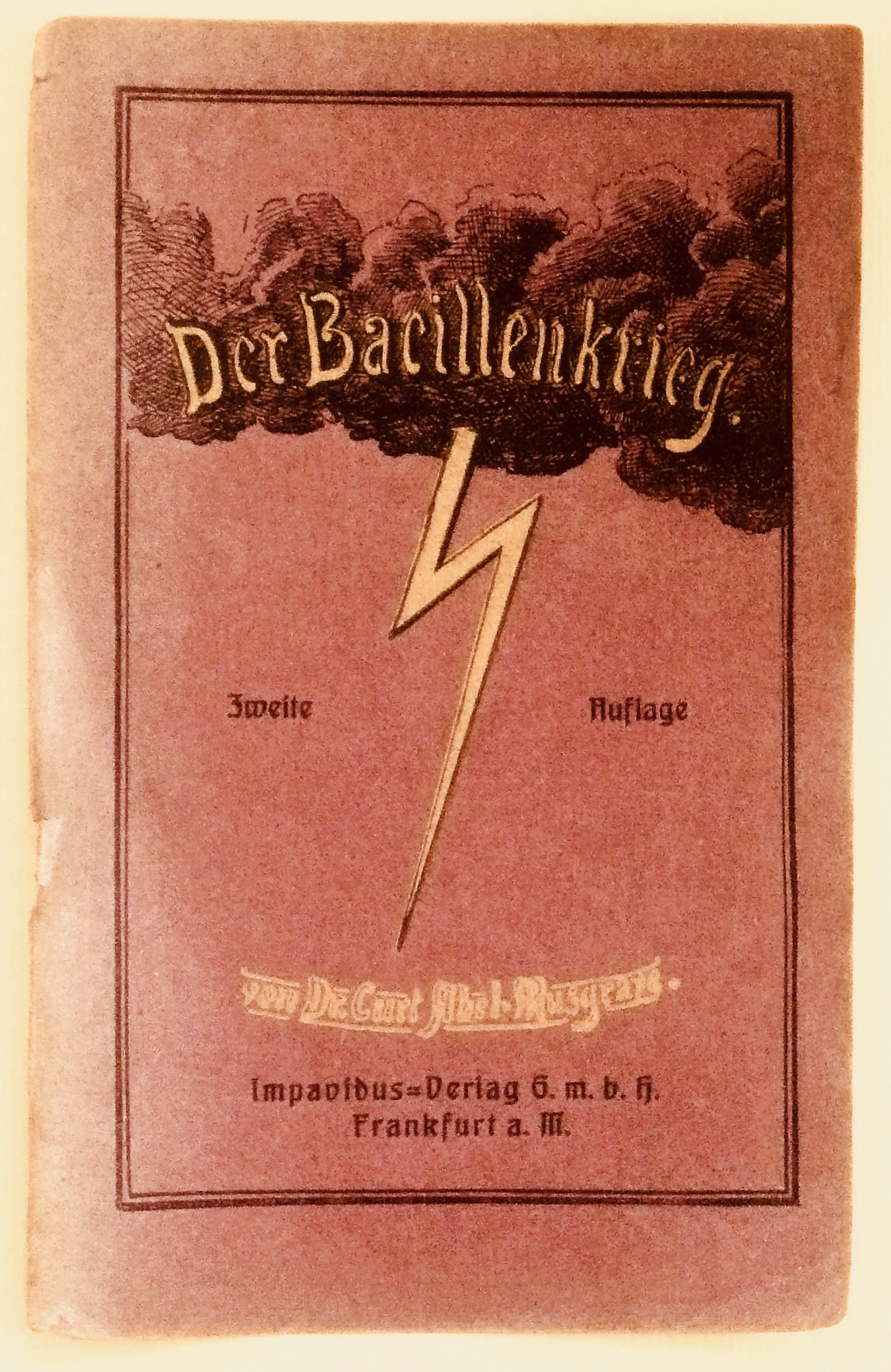 Curt Abel-Musgrave (1860–1938): De Bacillen Oorlog, Uitgeverij Impavidus, Frankfurt am Main 1922